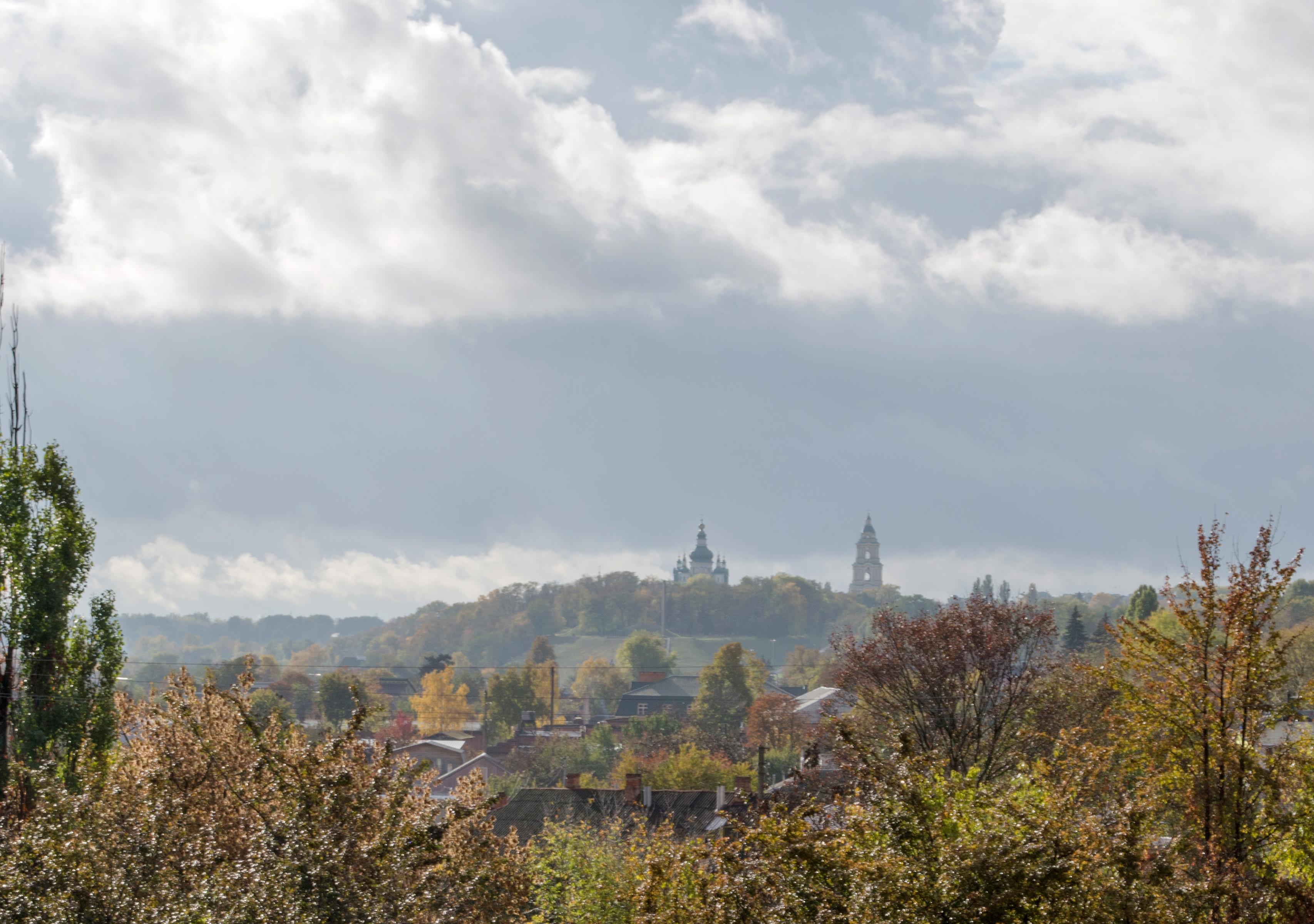 Комплекс споруд Троїцько-Іллінського монастиря, Чернігів, вул.Толстого, 92-Е